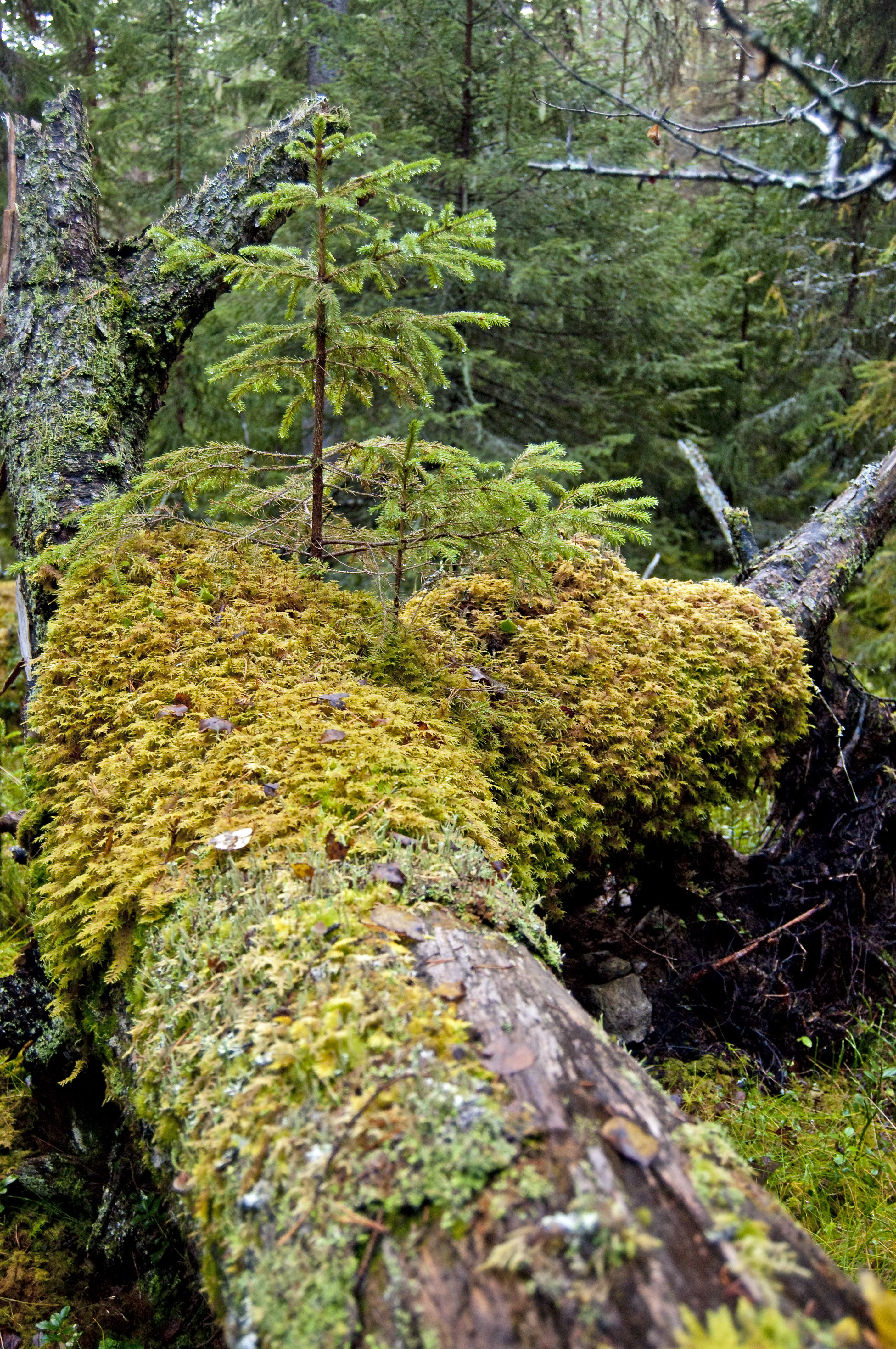 Omkullfallet träd i Berge urskog inom Östersunds kommun, Jämtlands län.